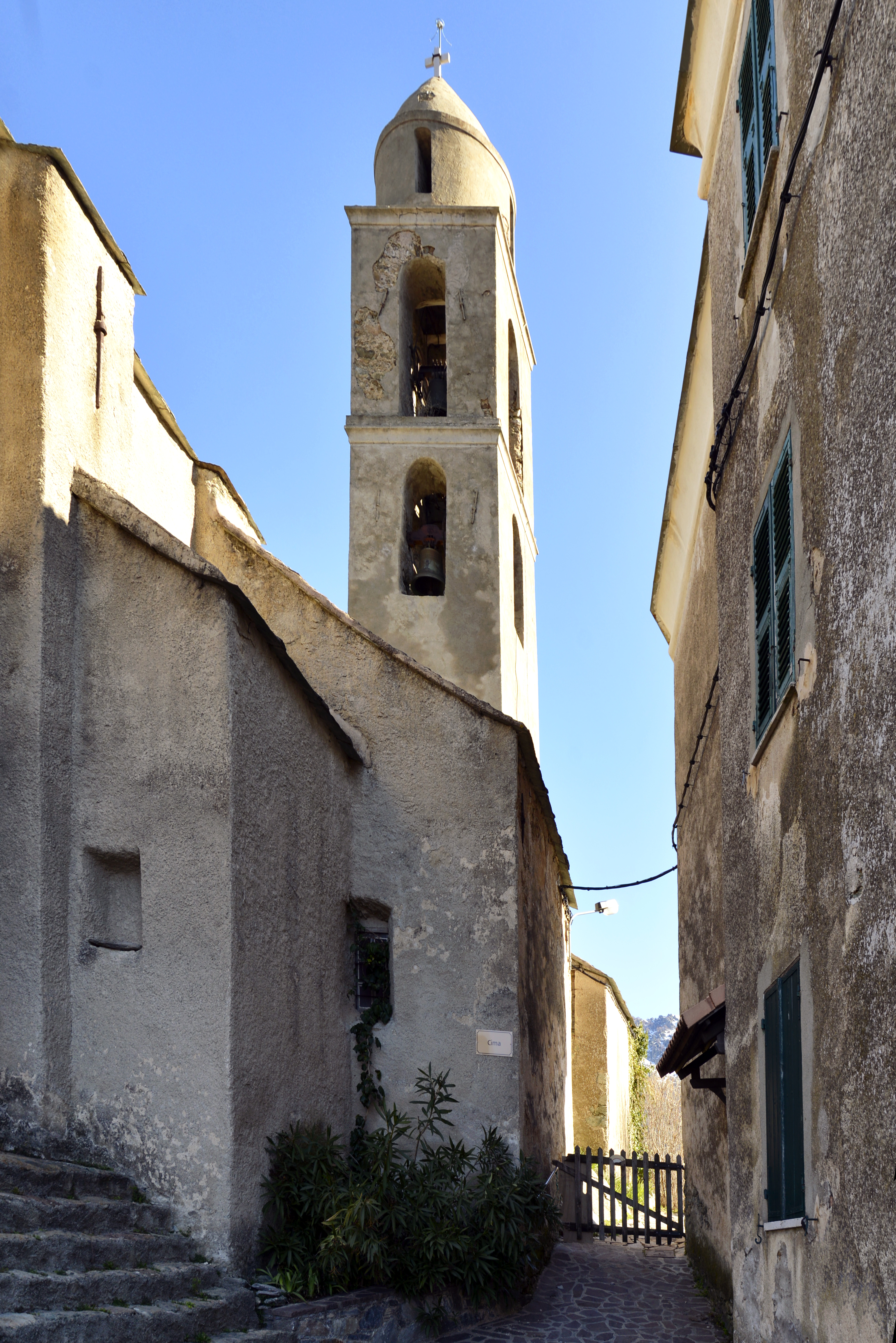 Santa-Lucia-di-Mercurio, Bozio (Haute-Corse) - L'église paroissiale Santa Lucia édifiée en 1842.